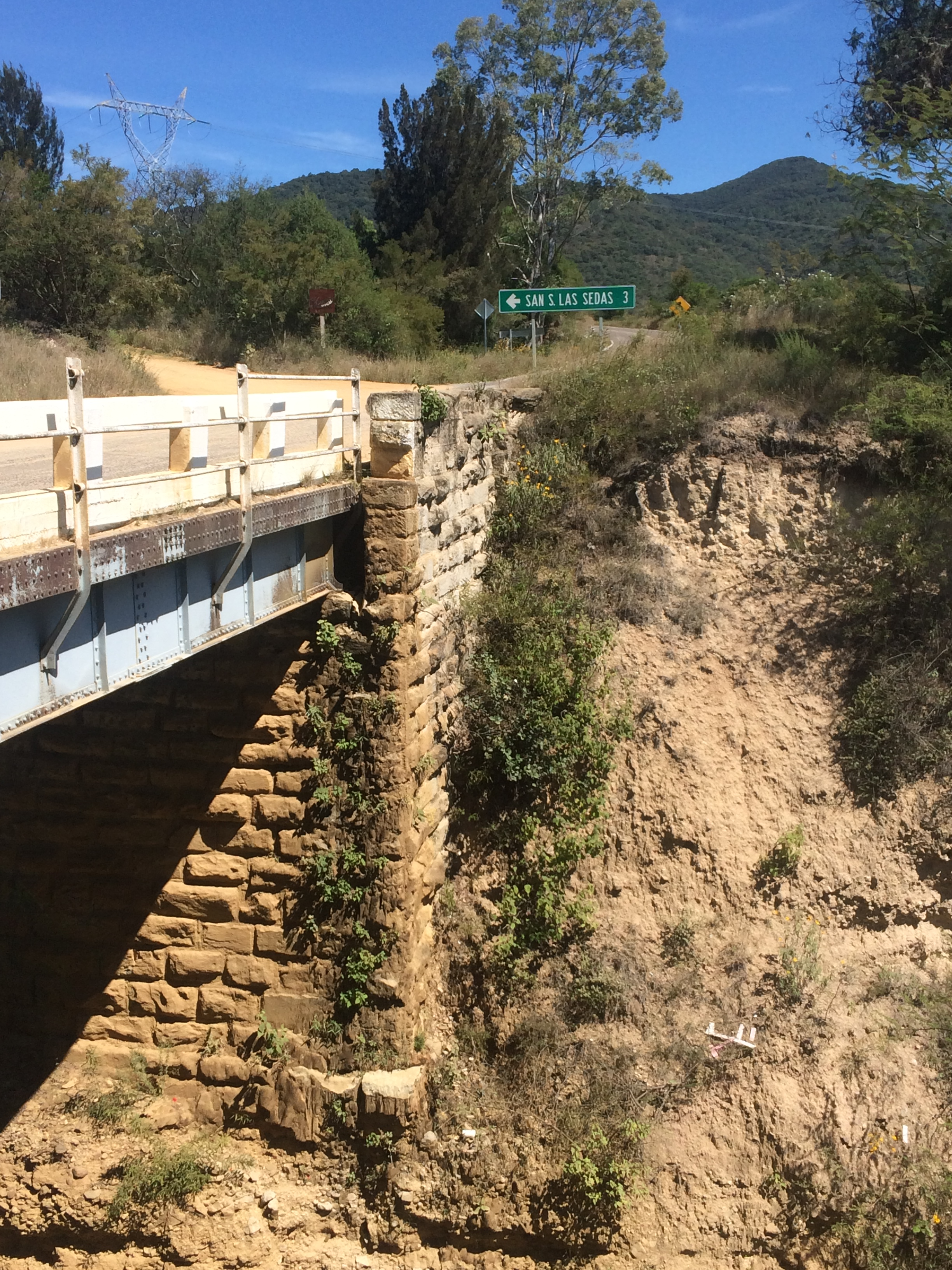 Por debajo el ferrocarril, por arriba la carretera Oaxaca-Cuicatlán.